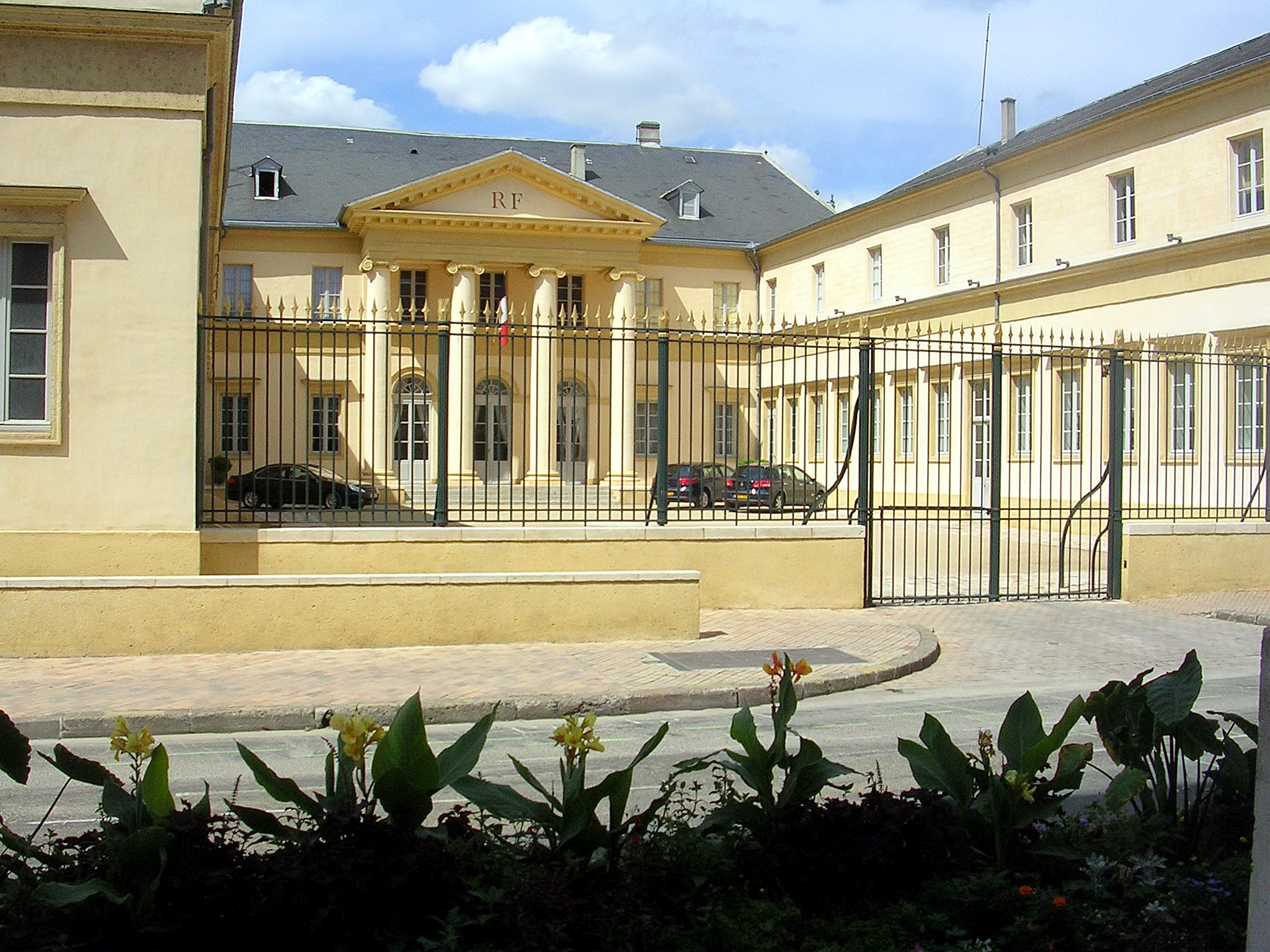 Préfecture des Landes à Mont-de-Marsan (France)